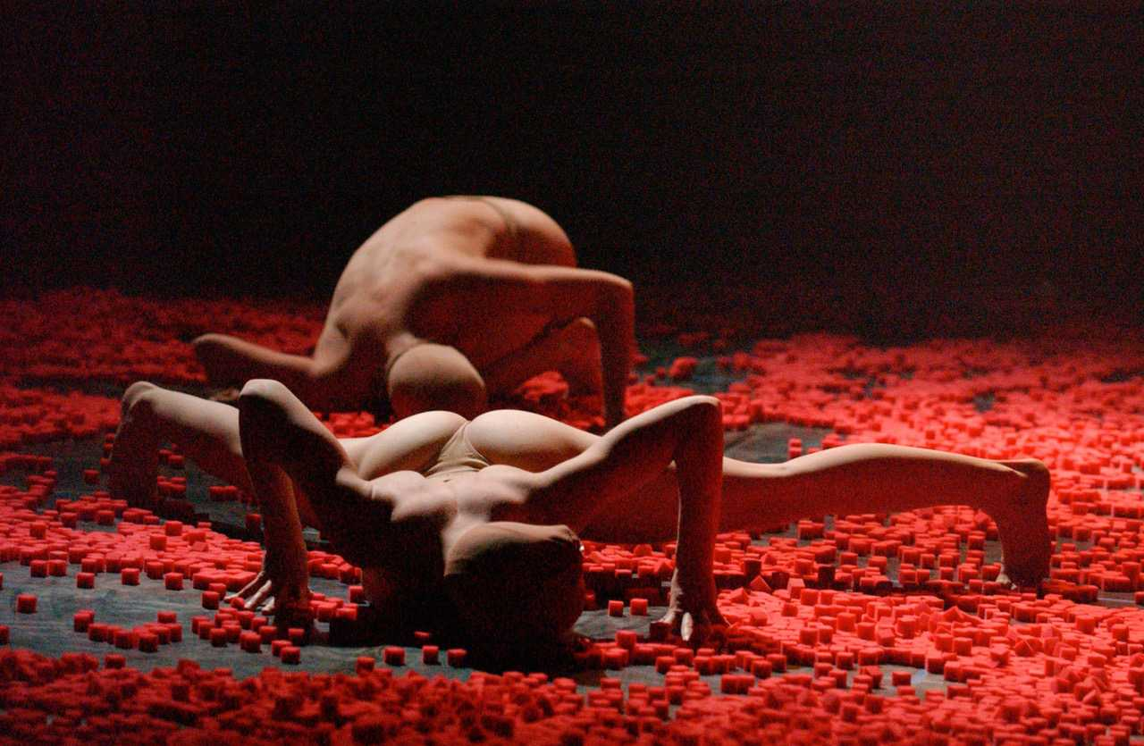 Aufführungsfoto